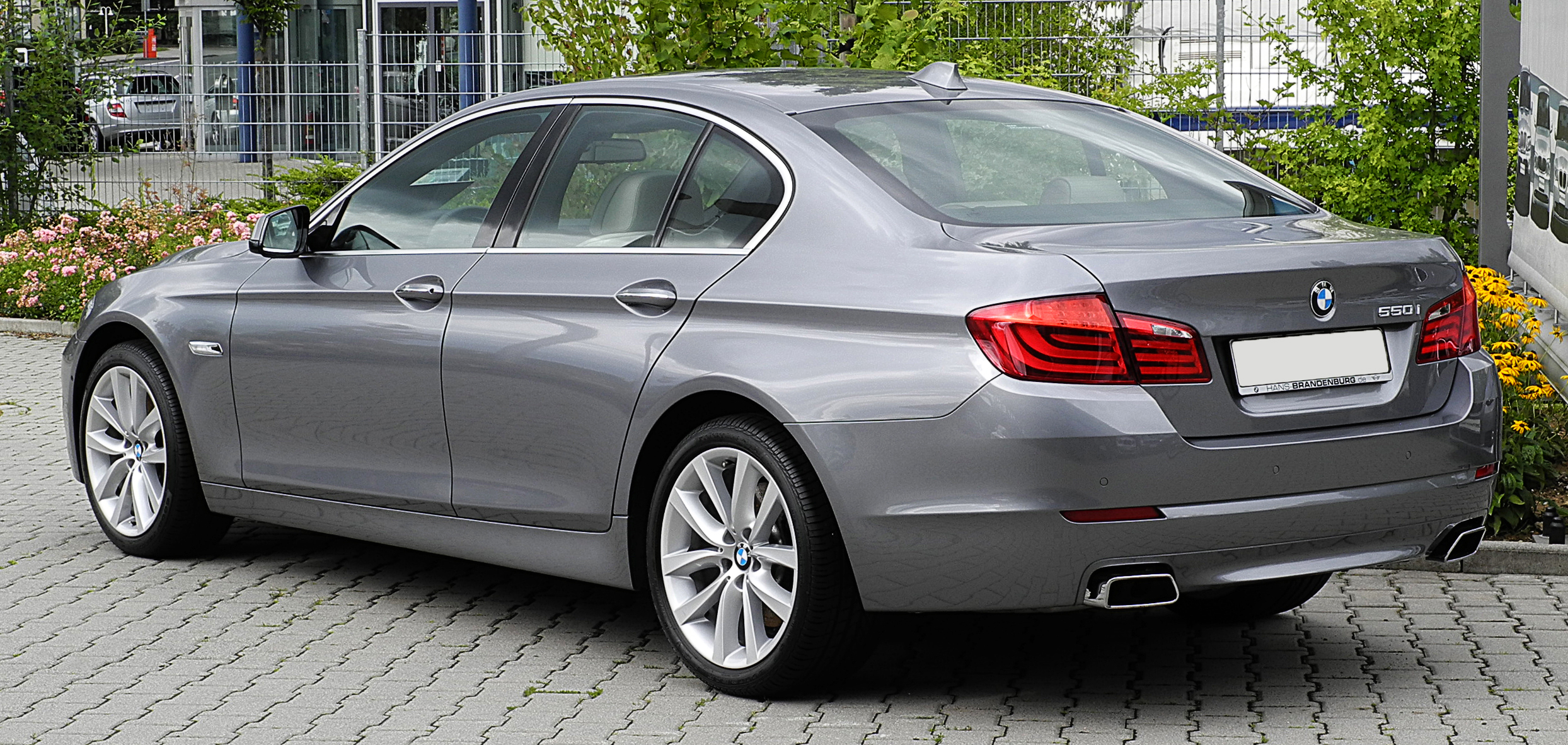 BMW 550i (F10)